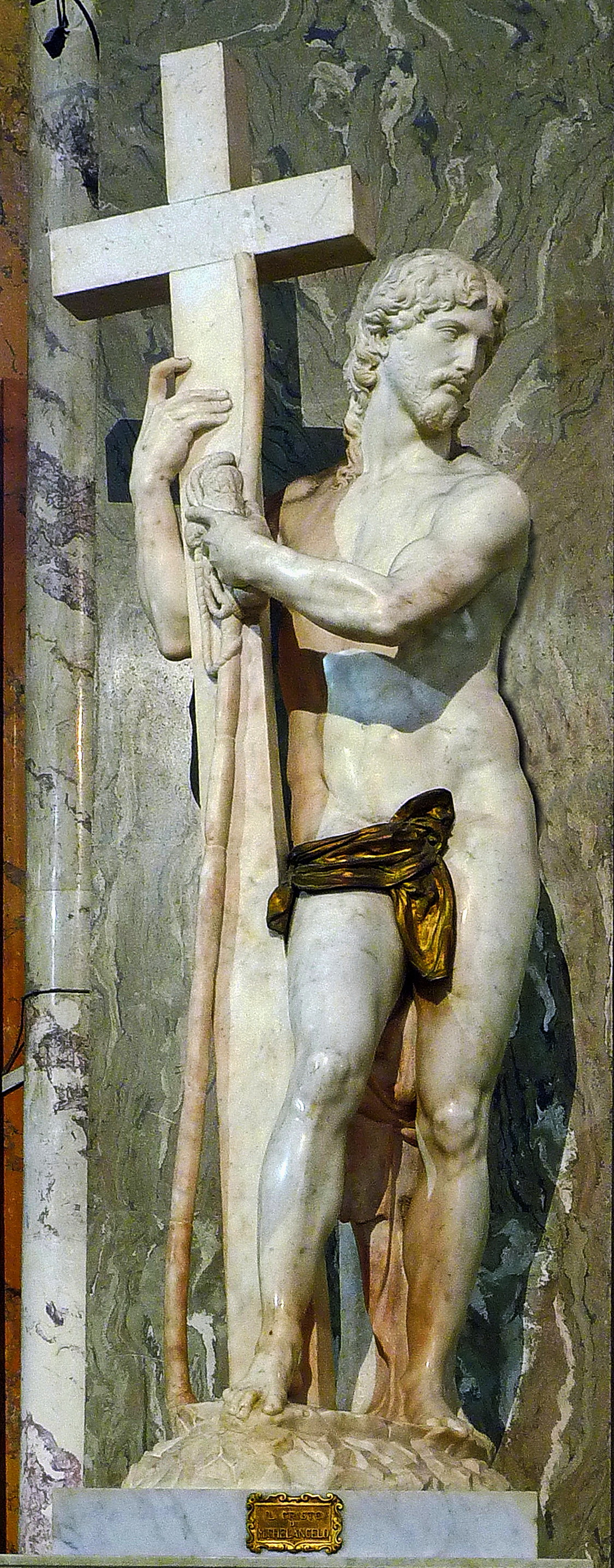 Santa Maria sopra Minerva (Rom), Statue des Auferstandenen Christus von Michelangelo